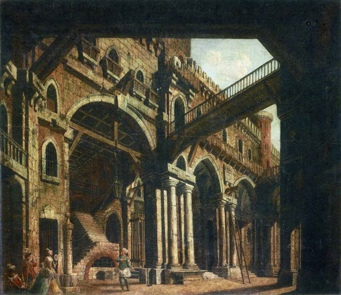 Szenenbild mit Gefängnis aus dem 3. Akt des »Montezuma«. Öl auf Leinwand, 97 x 114 cm. Stiftung Preußische Schlösser und Gärten, GK I 12008